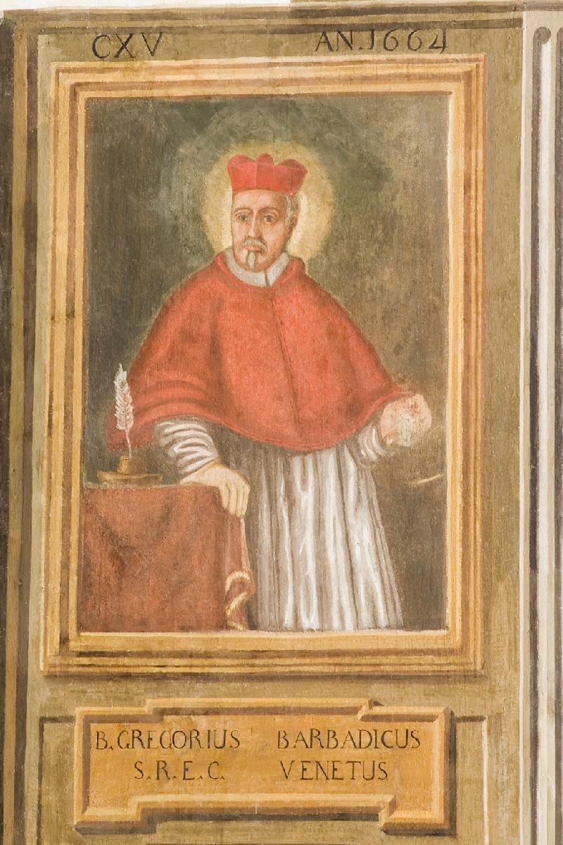 Tipologia dipinto murale Misure cm 132.0x91.0 (HxL) Datazione secolo XVIII (1700 - 1710) Autore ambito veneto Materia e tecnica tempera su muro Soggetto Beato Gregorio Barbarigo Iscrizioni iscrizione (sopra la cornice dipinta del ritratto) CXV AN. 1664 note: Caratteri dipinti. iscrizione (tabella dipinta sotto il ritratto) B. GREGORIUS BARBADICUS / S.R.E.C. VENETUS note: Caratteri dipinti.